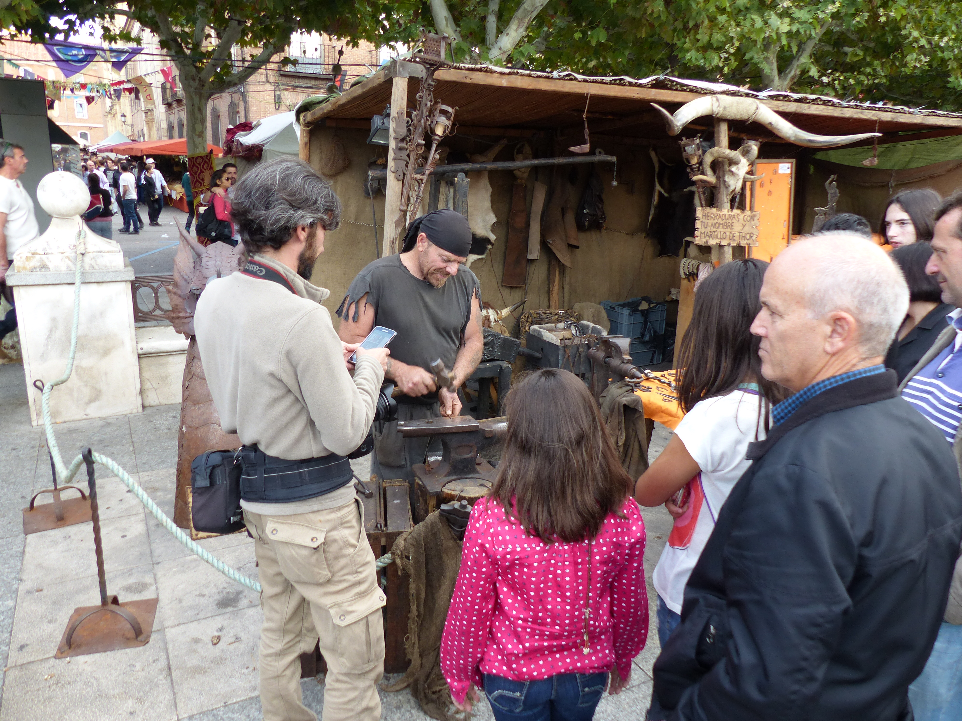 Gente observando el trabajo con el yunque, Alcalá de Henares.